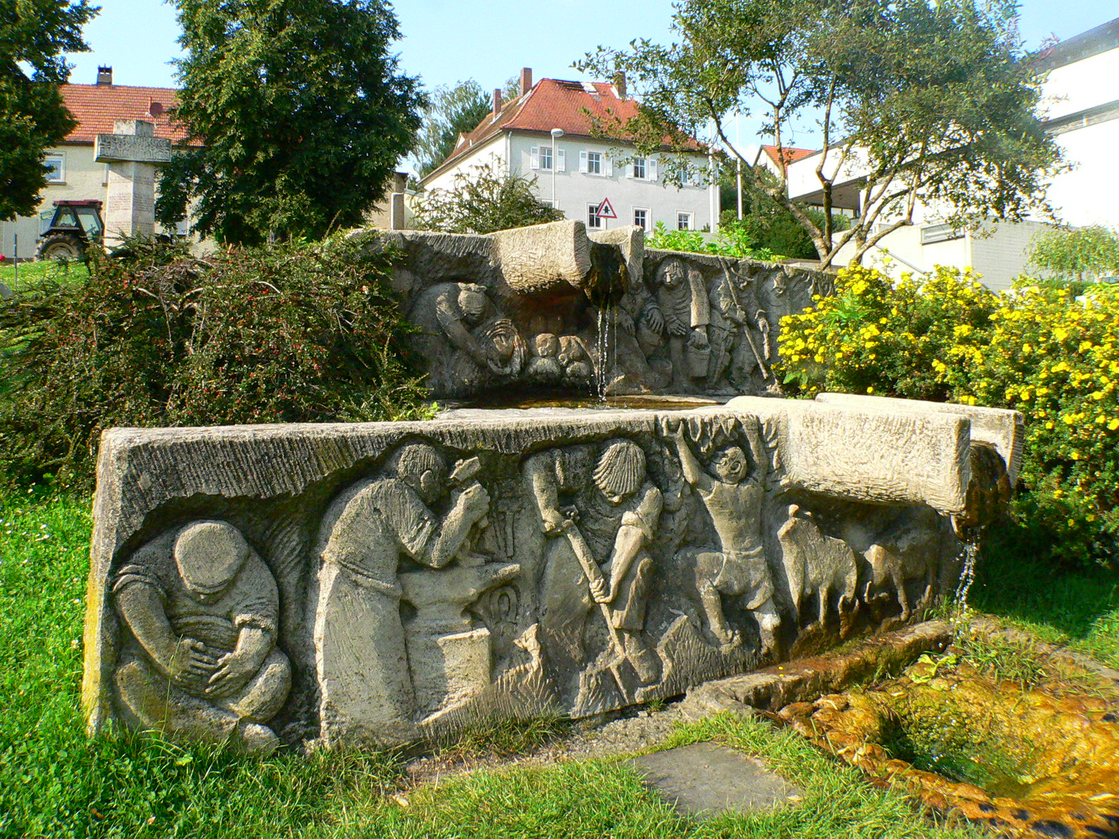 Sandsteinbrunnen in Schonungen, Ortsteil Forst, Germany, Bavaria